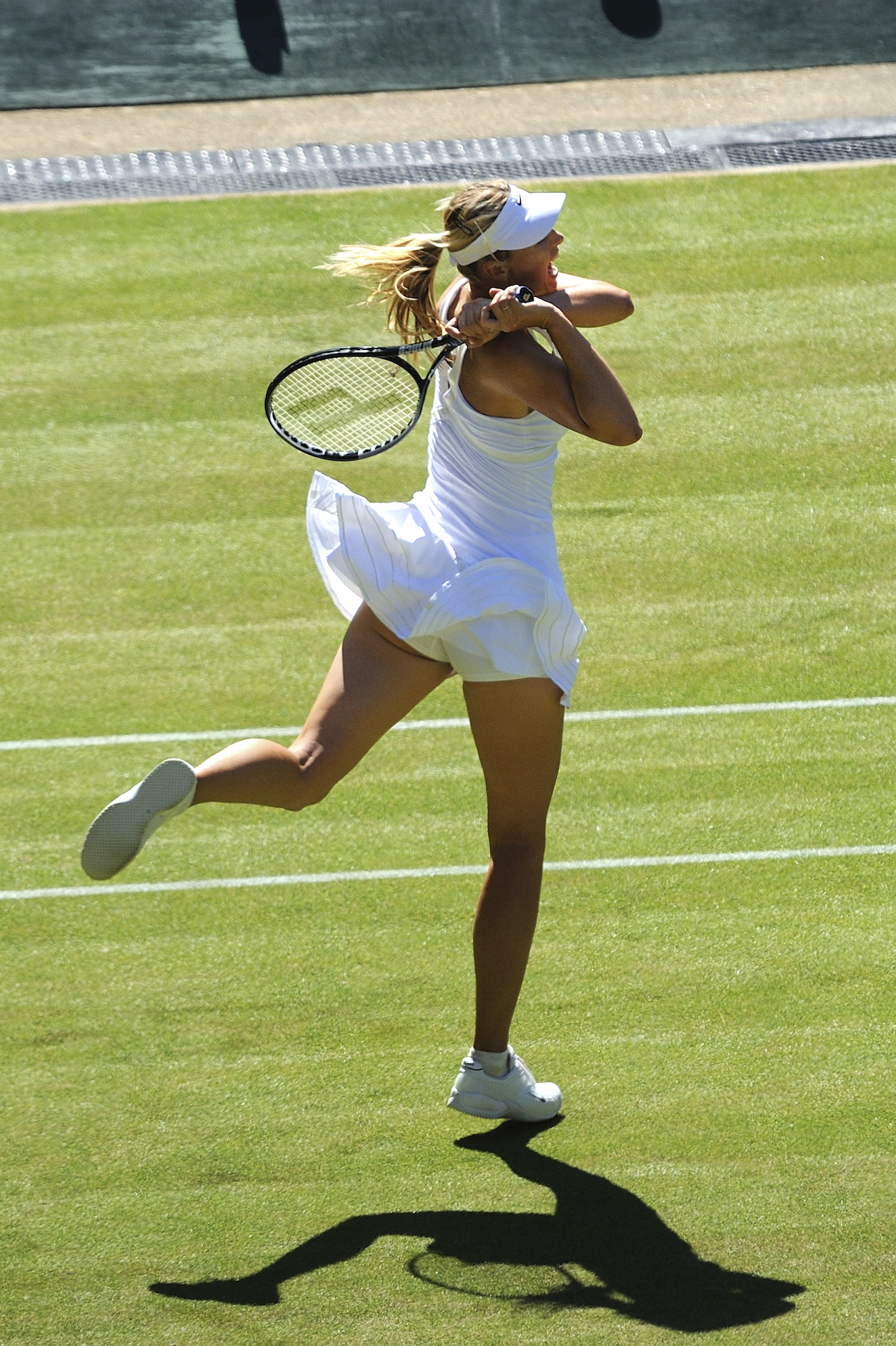 Maria Sharapova – Wimbledon 2009